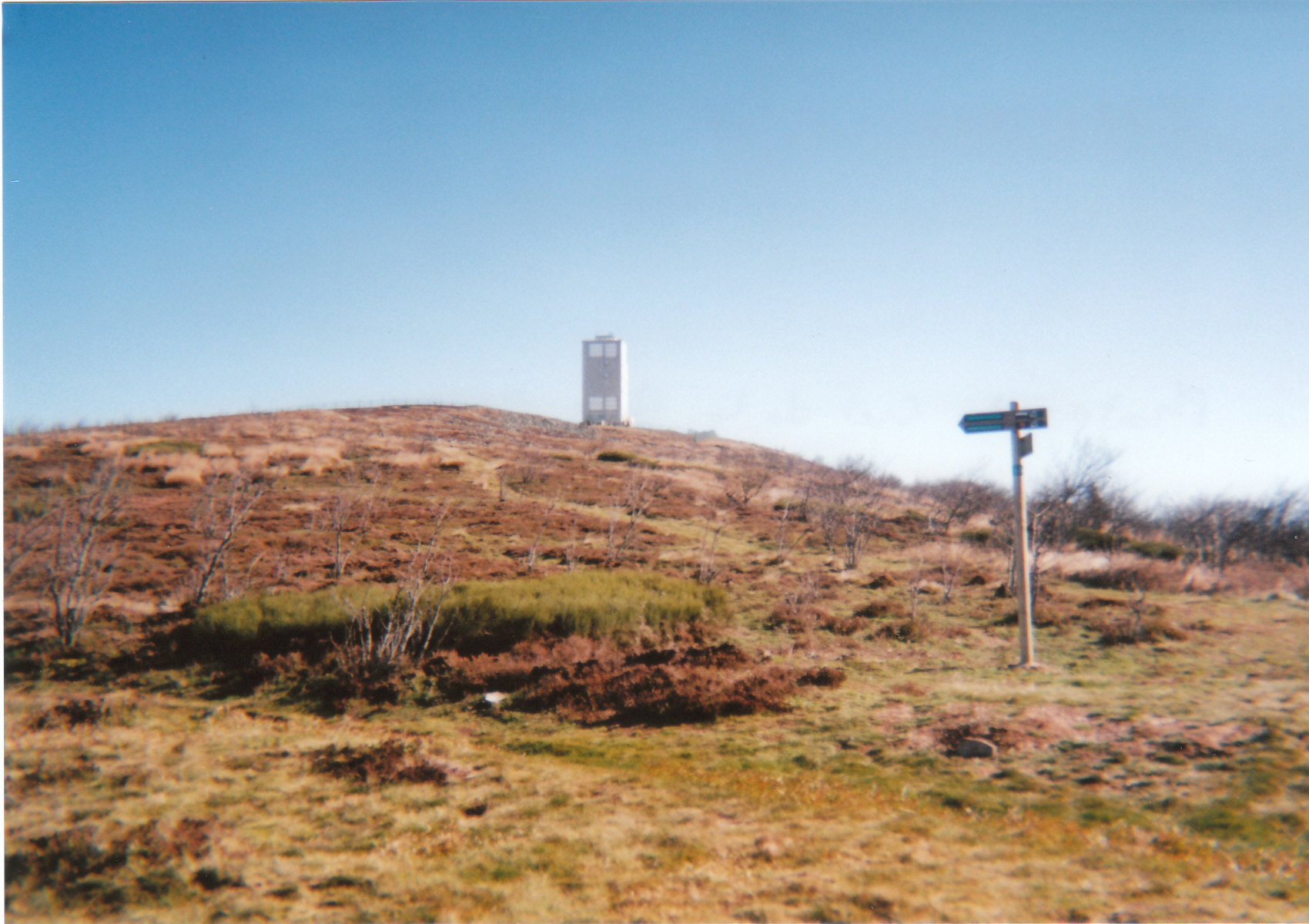 crêt de la Bote